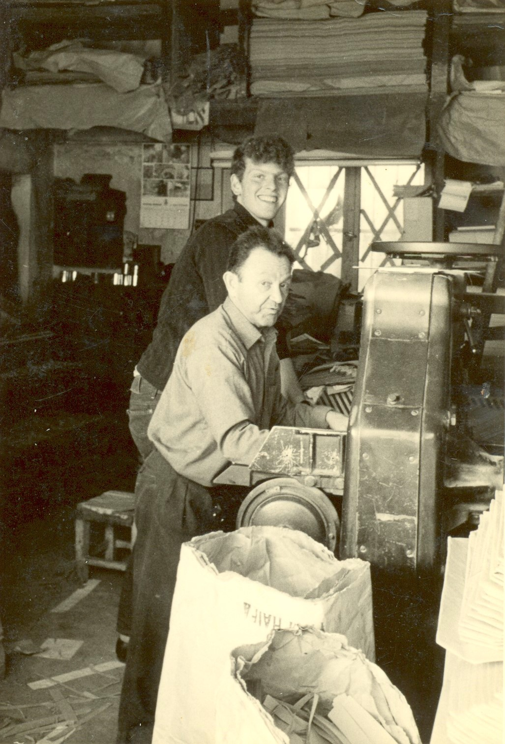 The City Nesher, Israel - Historical images תמונות היסטוריות של שכונת מרכז נשר בעיר נשר משנות ה-60 בית הדפוס של נשר הוקם בשנות ה-40 ופעל עד שנות ה-2000 בית הדפוס שכן במרכז המסחרי של מרכז נשר. בחזית בעל בית הדפוס ג'אג'א קוטון מאחוריו יהודה גרין